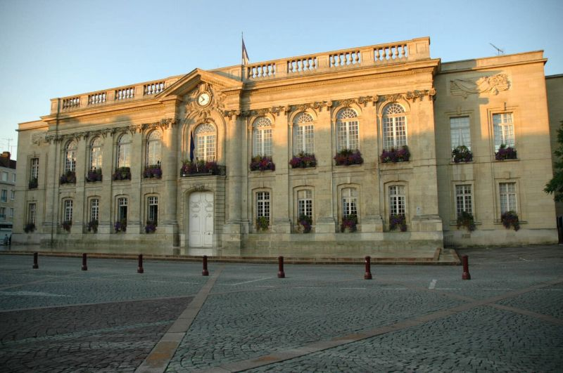 Mairie de Beauvais, bâtiment construit en 1752.